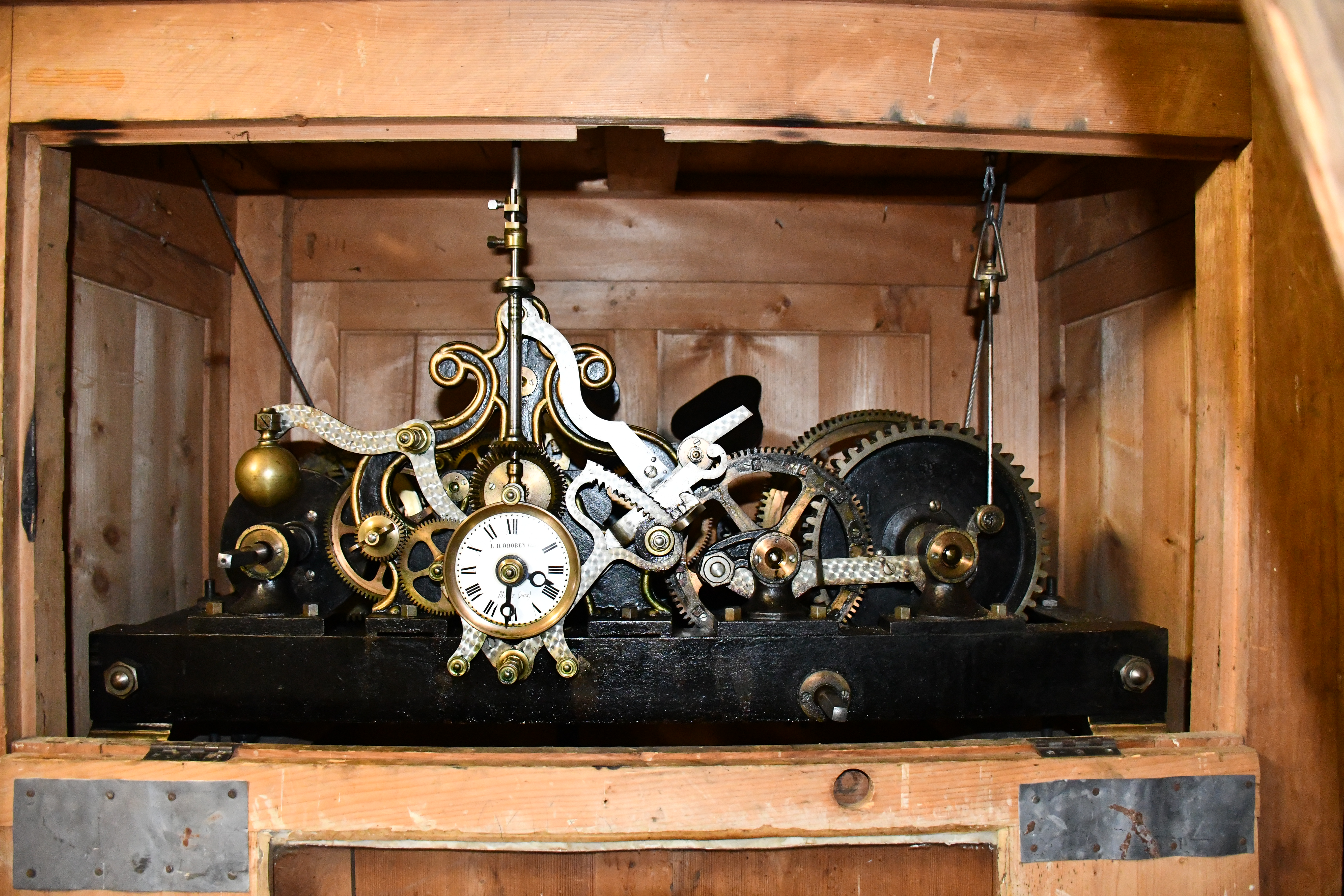 L'horloge de l'église catholique romaine Sainte-Pétronille, à Pregny-Chambésy. Le mécanisme de l'horloge fut placé en 1897 et a été élaboré par la société de Louis-Delphin Odobey Cadet à Morez (France). Il sert à donner l'heure sur le cadran du clocher et à sonner l'heure et la demie. Le poids de l'horloge et le poids des cloches doivent être remontés manuellement tous les huit jours.